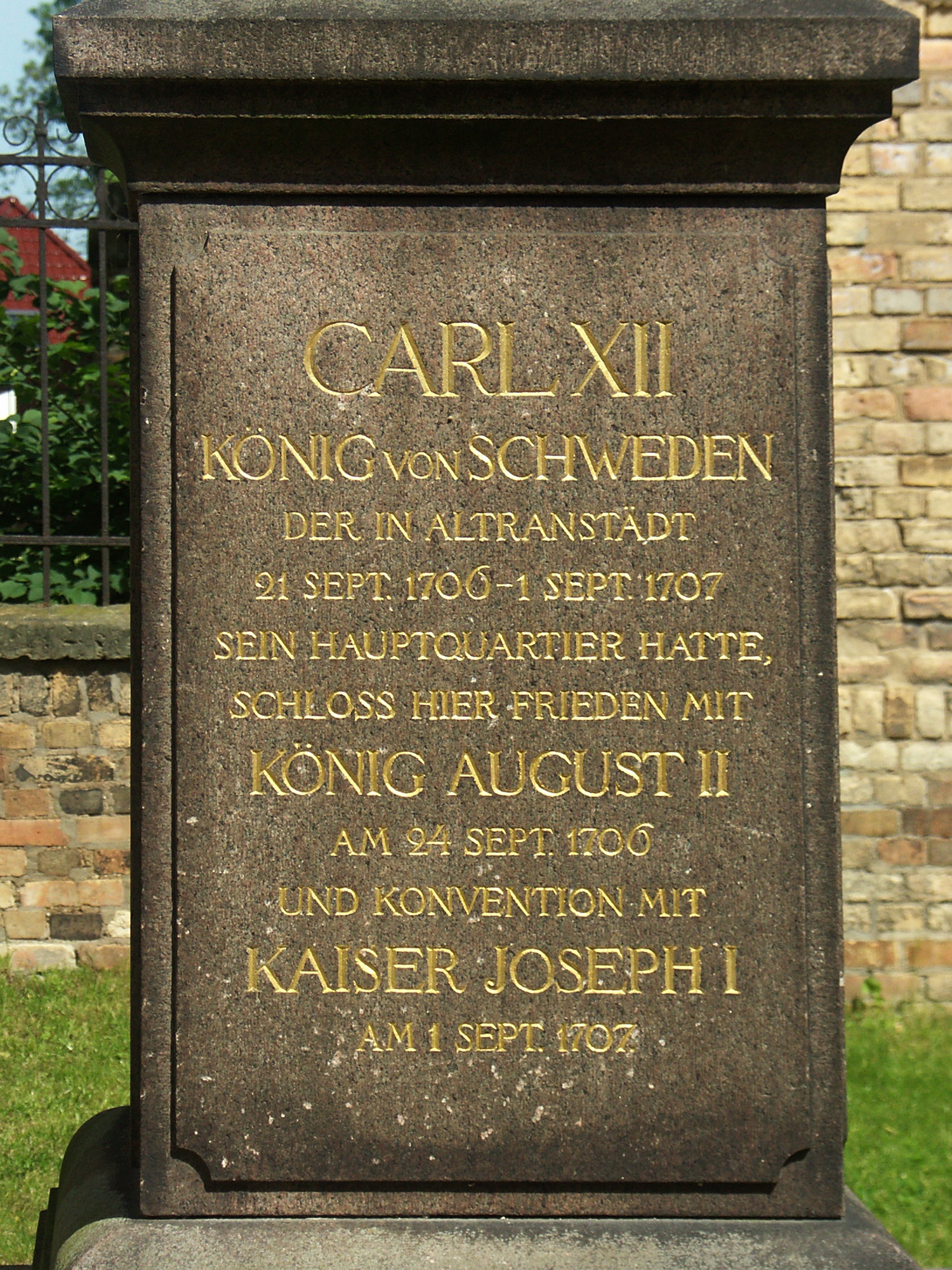 Die Inschrift auf dem Altranstädter Obelisk